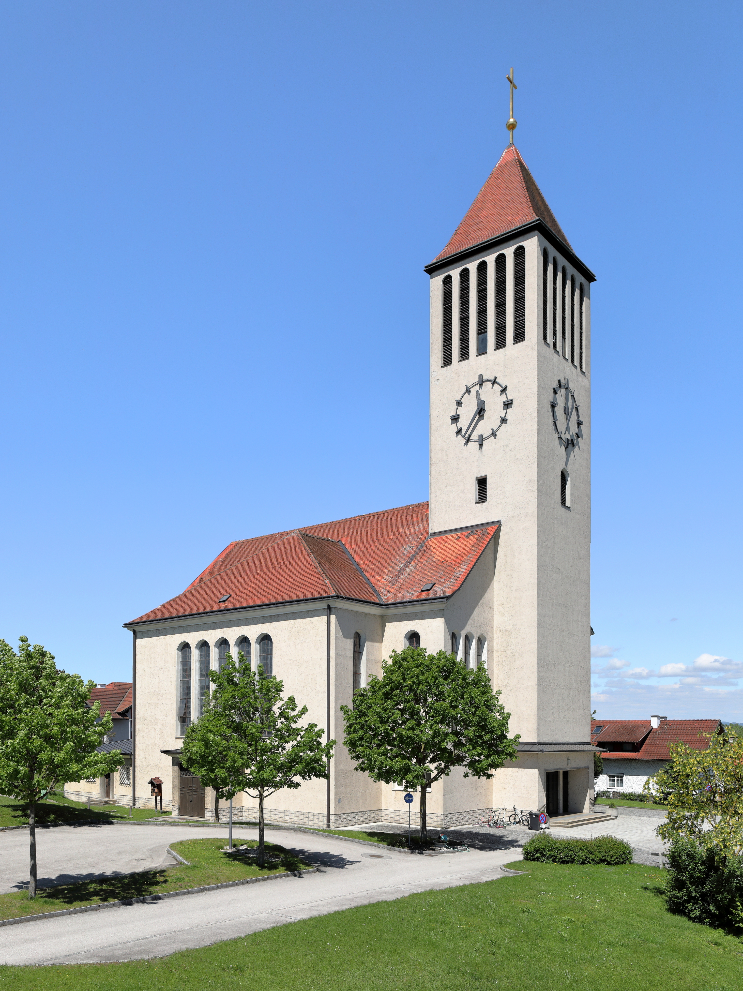 Südostansicht der Pfarrkirche St. Stephan in Stephanshart, ein Ortsteil der niederösterreichischen Marktgemeinde Ardagger. Die Kirche wurde von 1956 bis 1959 nach Plänen von Franz Barnath und Josef Gruber errichtet.